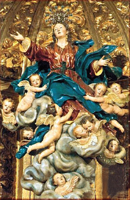 Talla de la imagen de Nuestra Señora de la Asunción, obra del escultor Luis Salvador Carmona. Patrona de Serradilla, Cáceres.